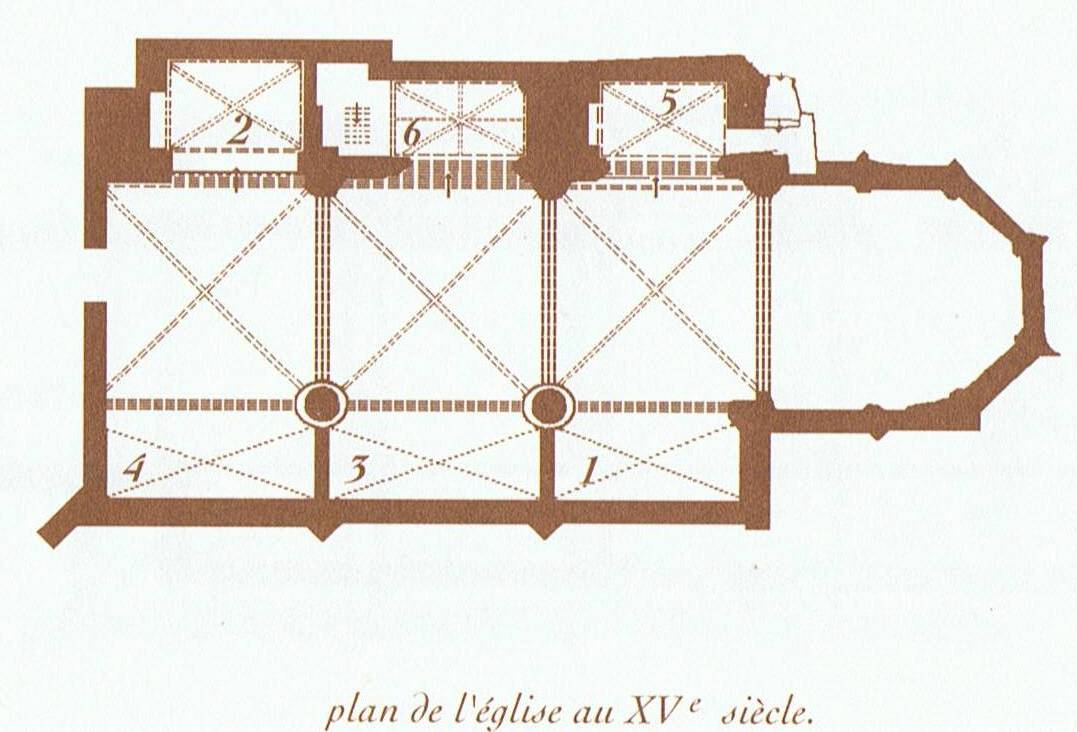 Plan eglise Saint Nicolas au 15è siècle